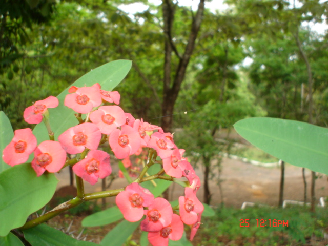 Lagoa Santa, MG, Brasil.